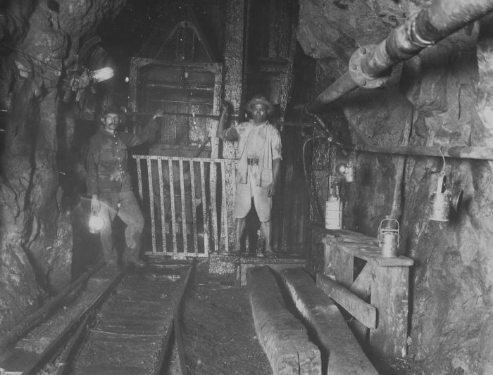 foto. Mijnwerkers met een lorrie bij de lift van een mijnschacht in de goud- en zilvermijnen te Tambang Sawah in de residentie Benkoelen